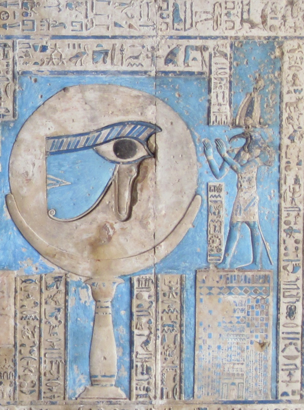 Thot en adoration devant le Disque lunaire / Oudjat, plafond de Denérah